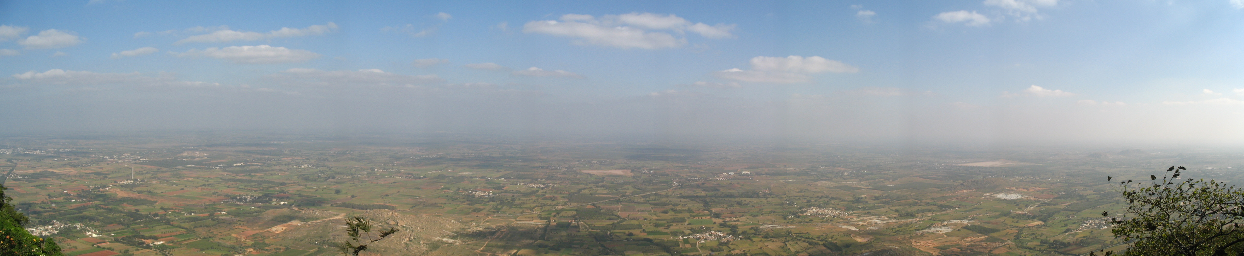 Panorama from Nandi Hills, Karnataka, India